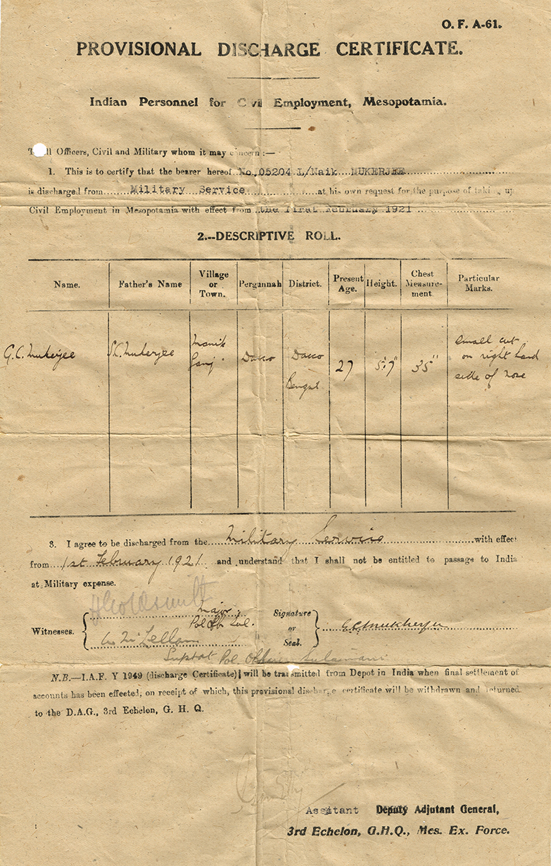 کوردی: بڕوانامەی دەرچوون لە خزمەتی سەربازیی گۆگۆل جاند مکورجی